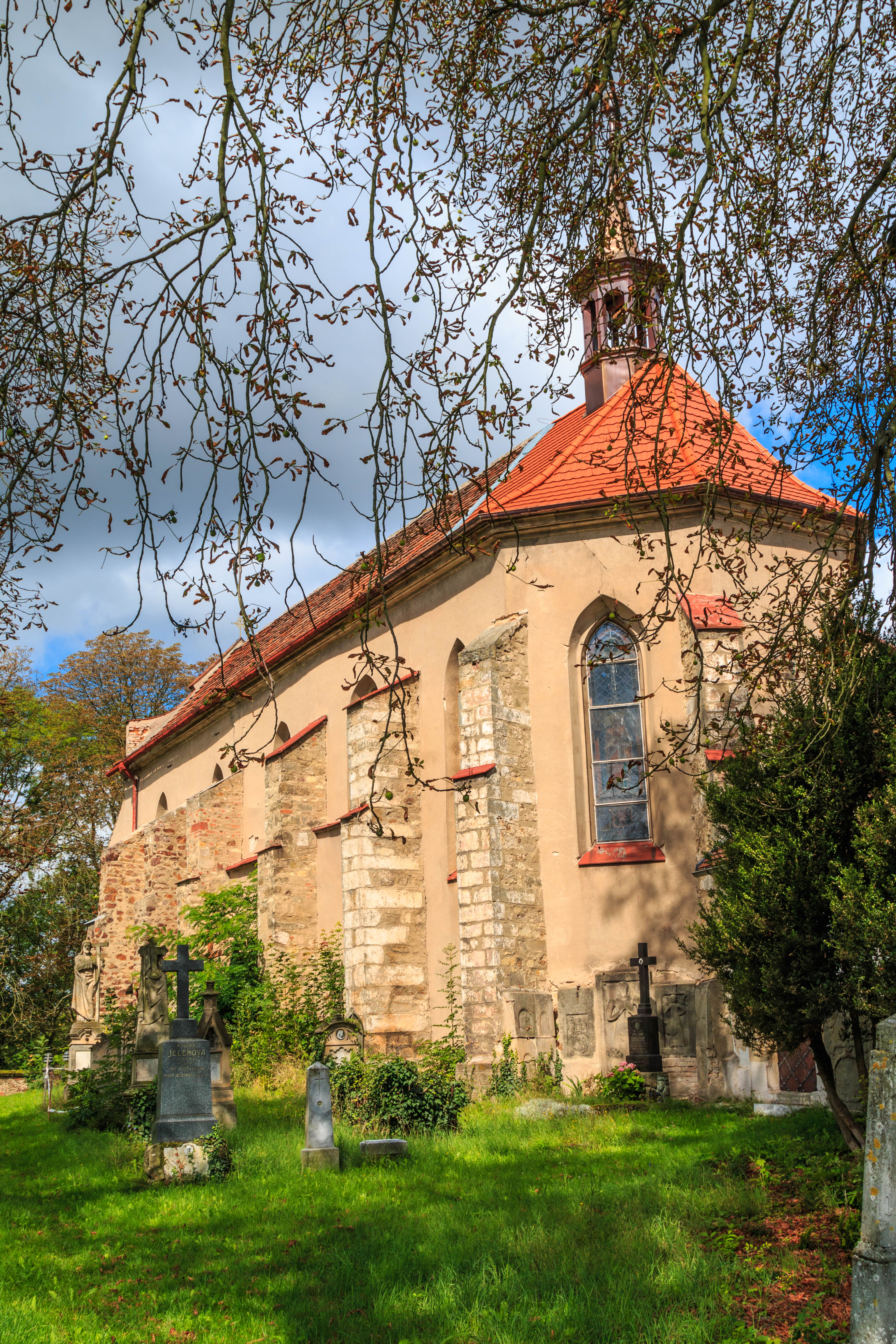 Kostel svatého Václava, Jezbořice.